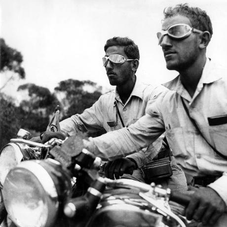 عکسی از برادران امیدوار